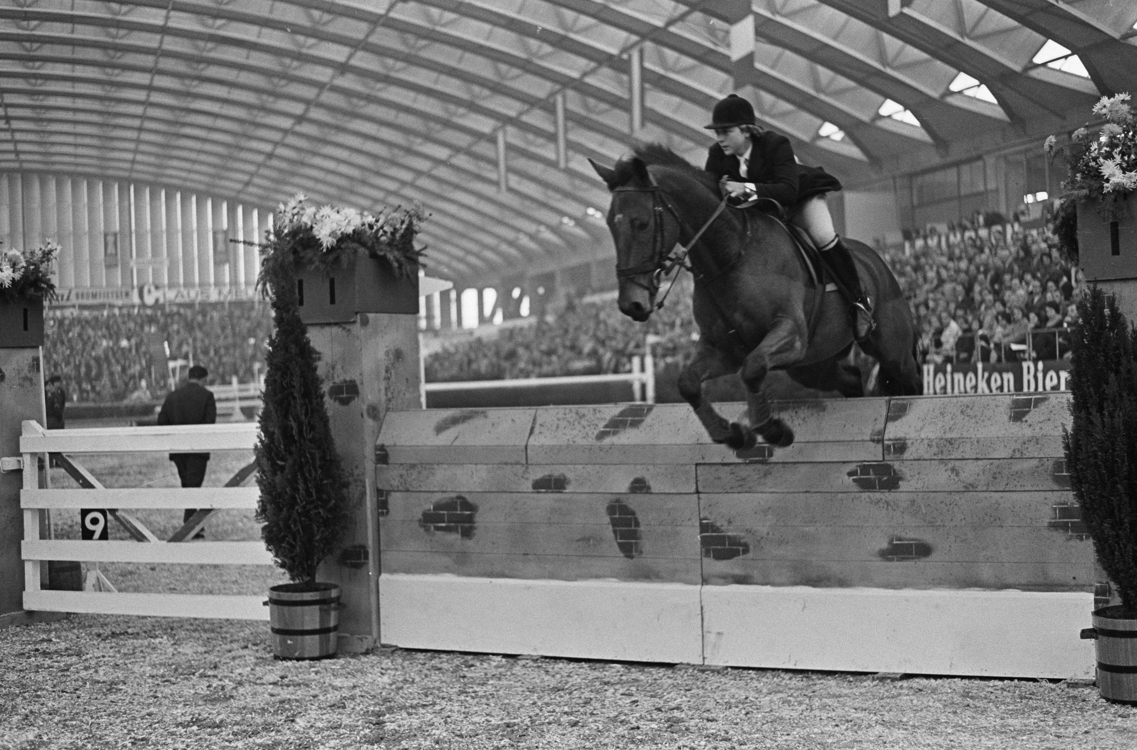 Collectie / Archief : Fotocollectie Anefo Reportage / Serie : Jumping Amsterdam 1965 in de RAI te Amsterdam Beschrijving : Coakes tijdens sprong op het paard Little Yellow Datum : 24 oktober 1965 Locatie : Amsterdam, Noord-Holland Trefwoorden : paarden, paardensport Persoonsnaam : Coakes, Marion Fotograaf : Fotograaf Onbekend / Anefo Auteursrechthebbende : Nationaal Archief Materiaalsoort : Negatief (zwart/wit) Nummer archiefinventaris : bekijk toegang 2.24.01.05 Bestanddeelnummer : 918-3571